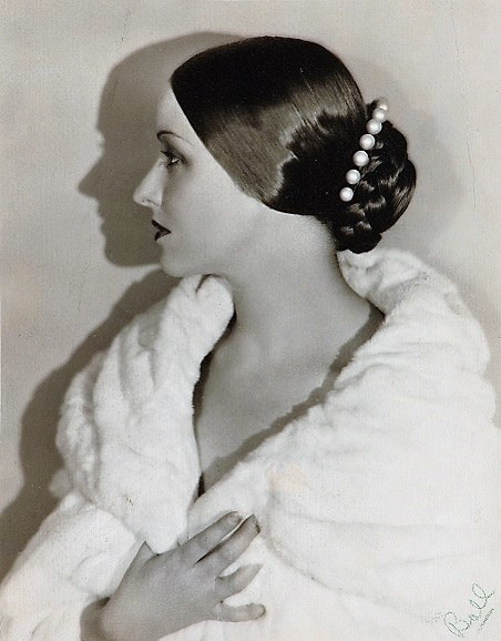 Natacha Rambova